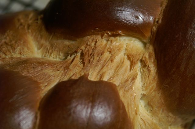 Tresse au beurre